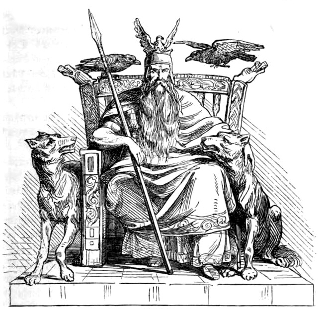 Wodan